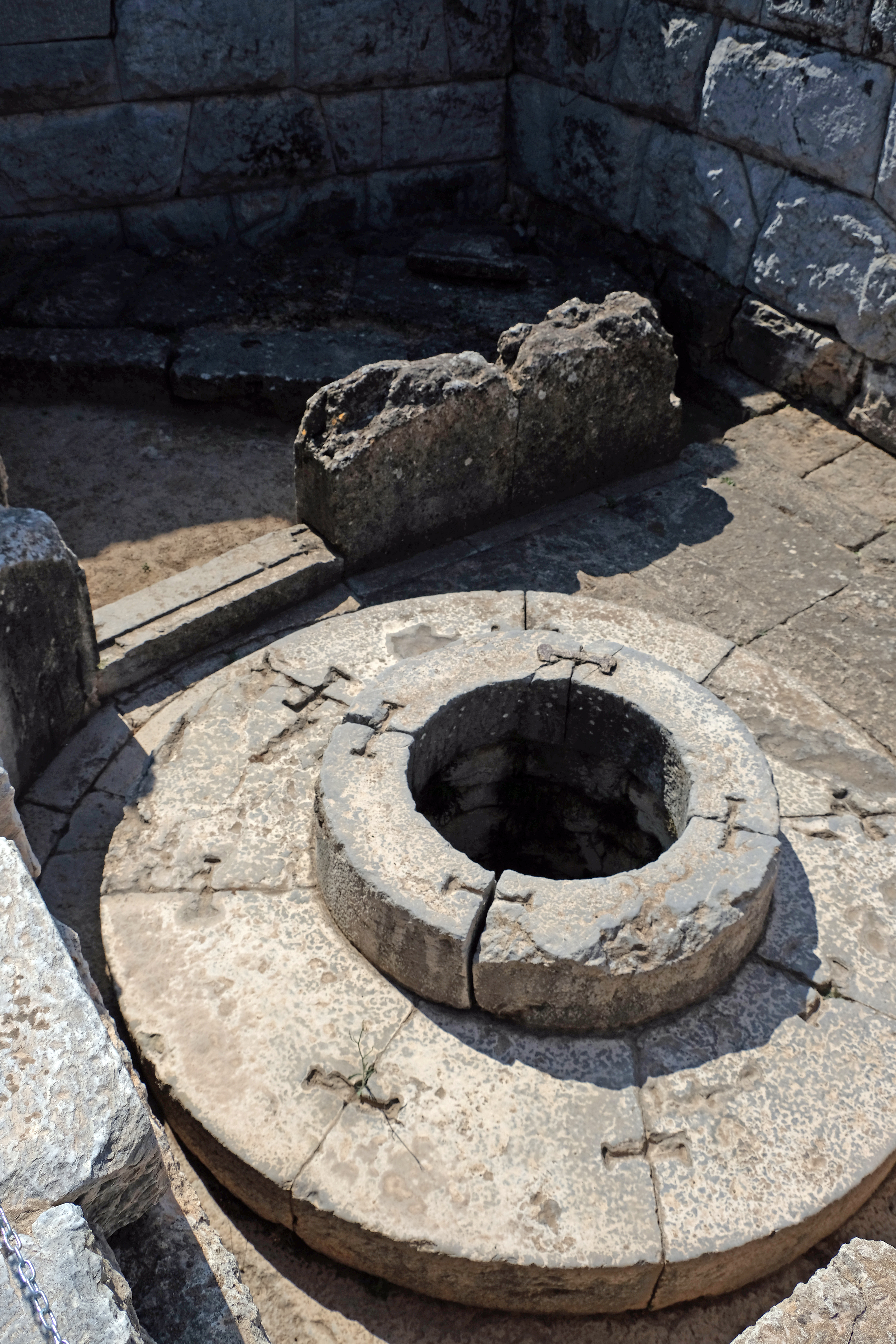 veduta dall'alto del pozzo